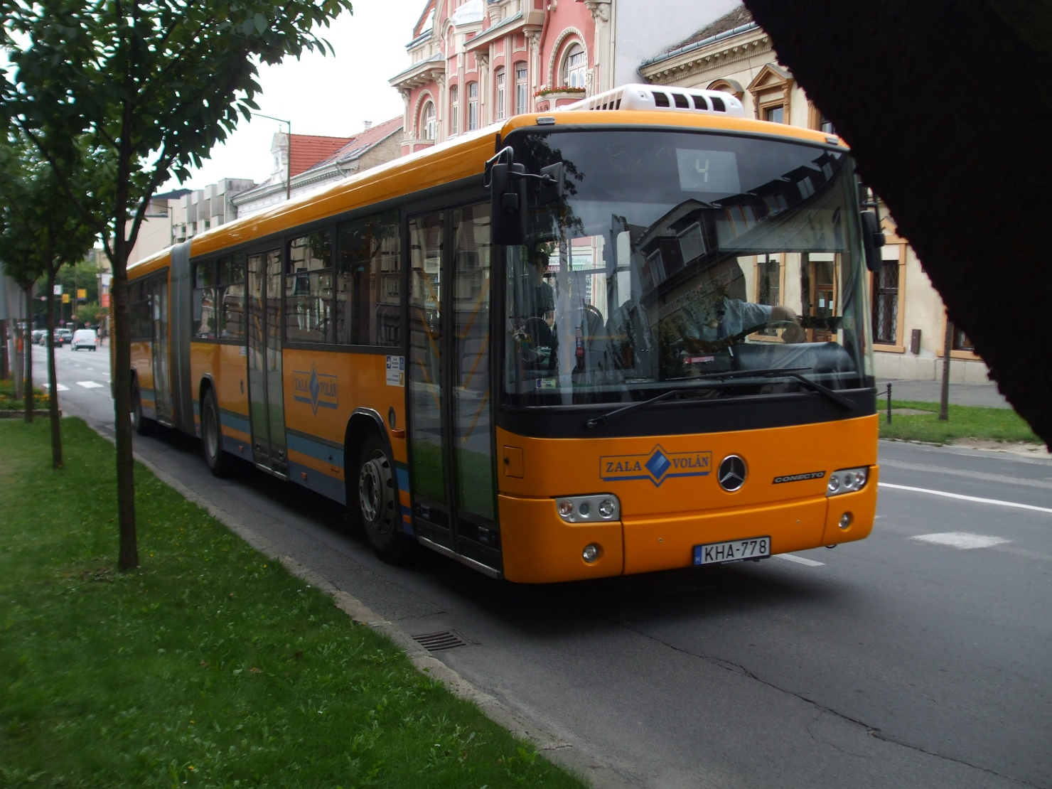 Conecto G in der ungarischen Stadt Nagykanizsa